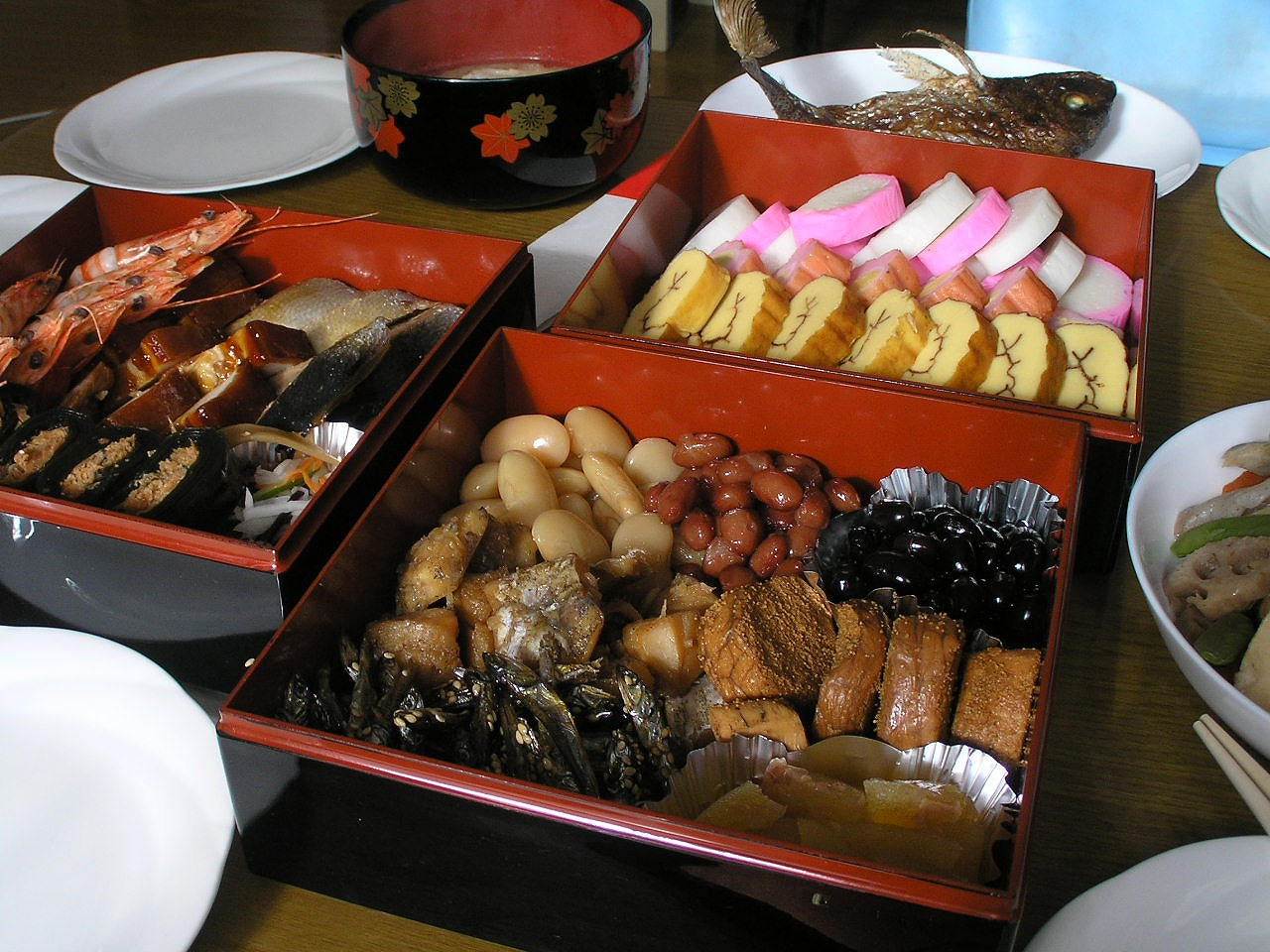 一般家庭における御節料理（おせちりょうり）